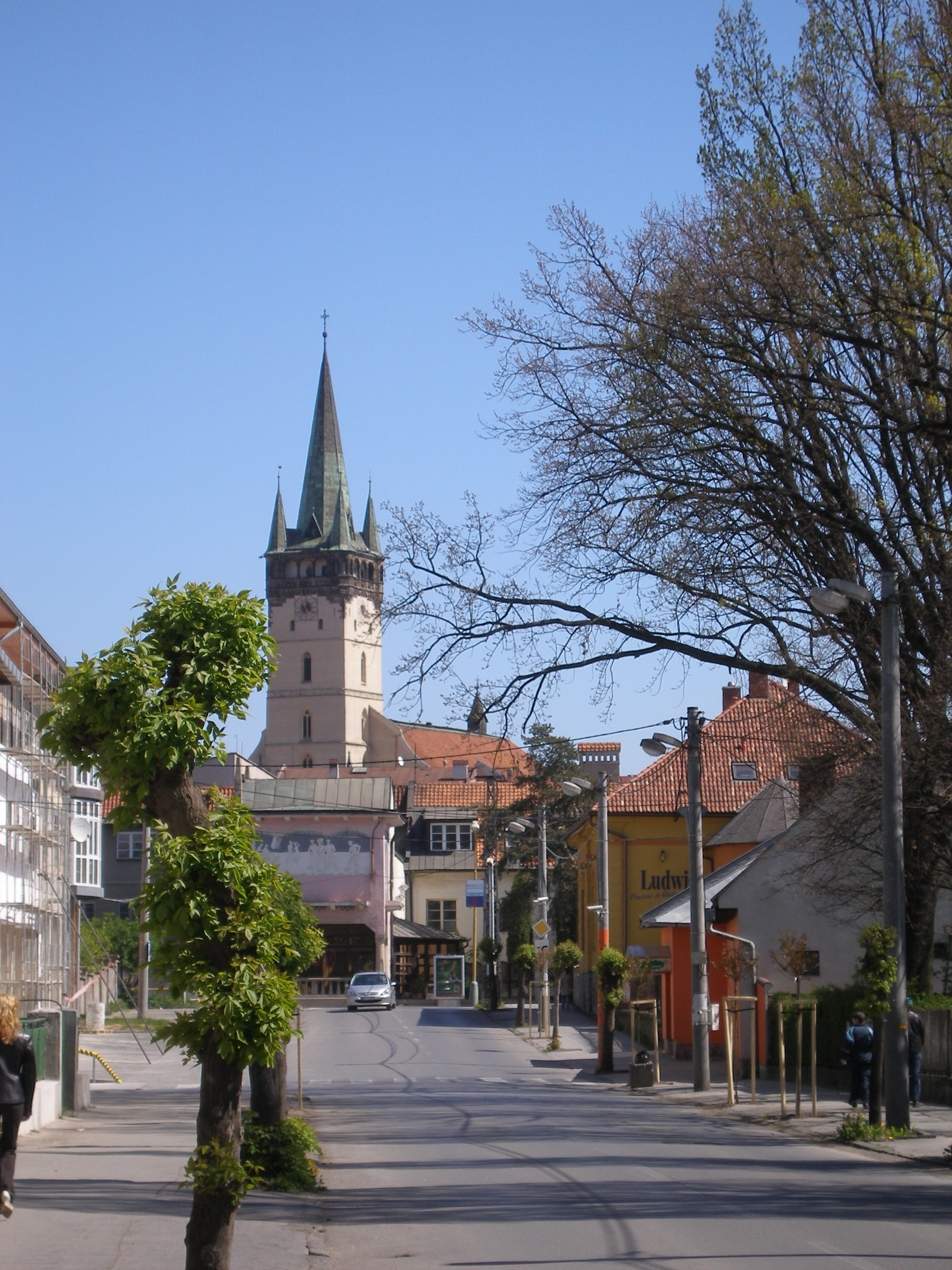 Veža Konkatedrály Dómu sv.Mikuláša v Prešove. Región Šariš.